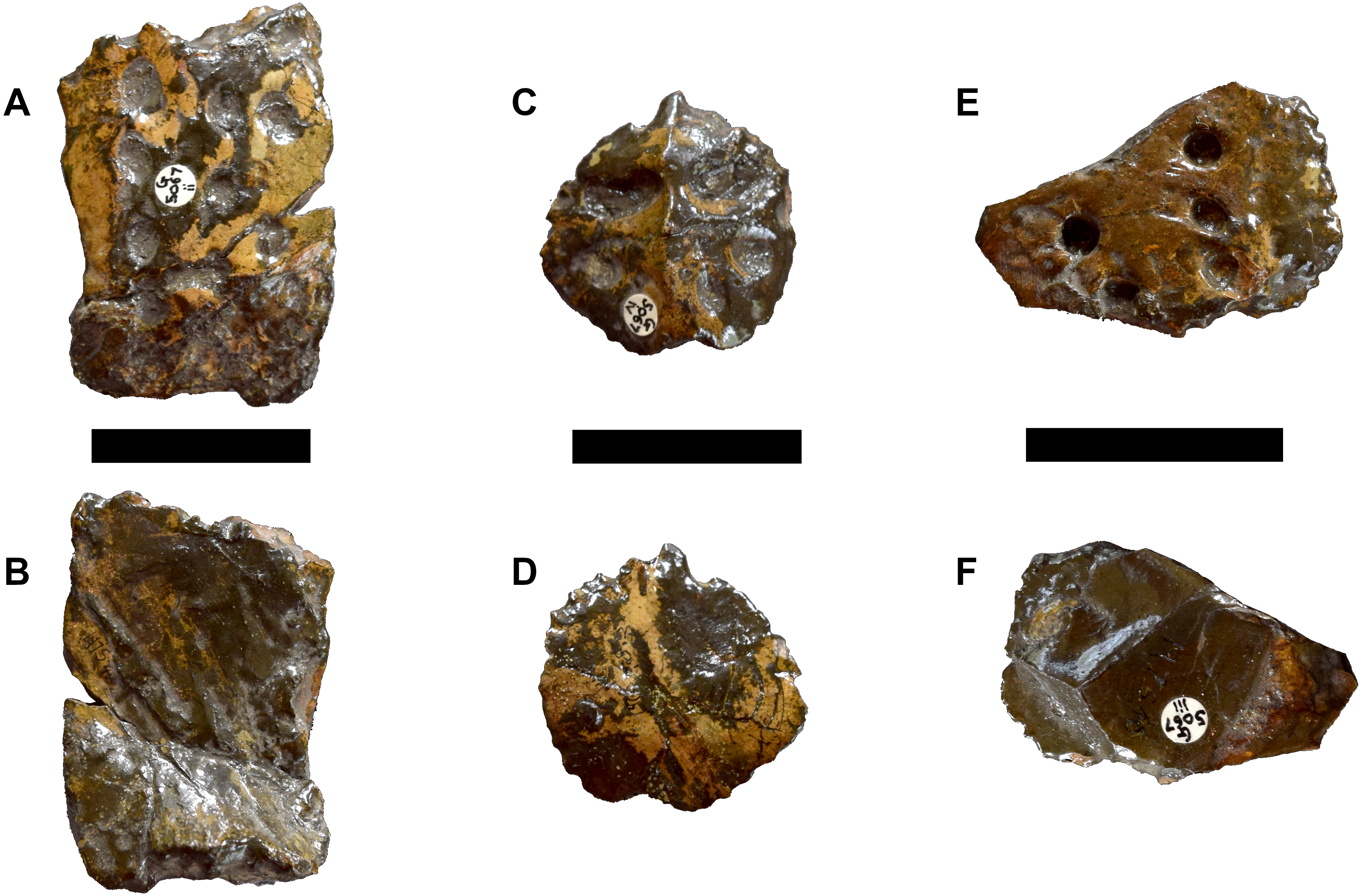 DORCM G.05067ii-iv osteoderms of Bathysuchus megarhinus gen. et. sp. nov. A, Dorsal-sacral osteoderm DORCM G.05067ii in dorsal view. B, dorsal-sacral osteoderm DORCM G.05067ii in ventral view. C, caudal osteoderm DORCM G.05067iv in dorsal view. D, caudal osteoderm DORCM G.05067iv in ventral view. E, ventral osteoderm DORCM G.05067iii in view. F, ventral osteoderm DORCM G.05067iv in dorsal view. Scale bar equals 3 cm.